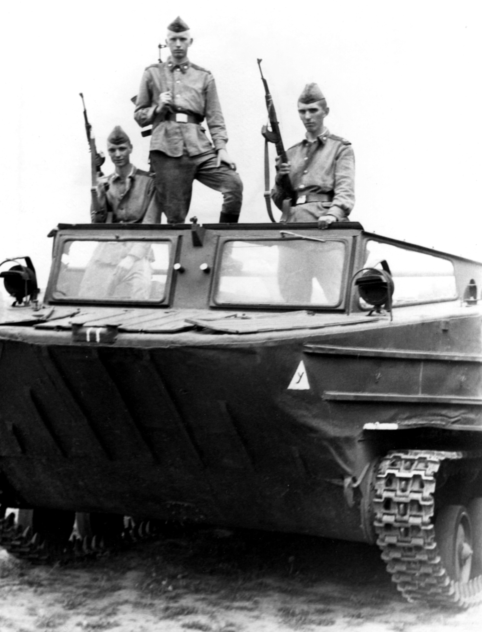 Плавающий транспортёр